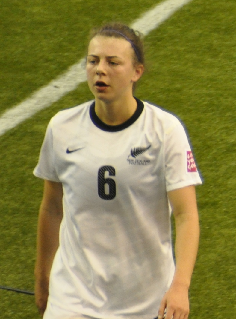 Coupe du monde féminine FIFA U-20